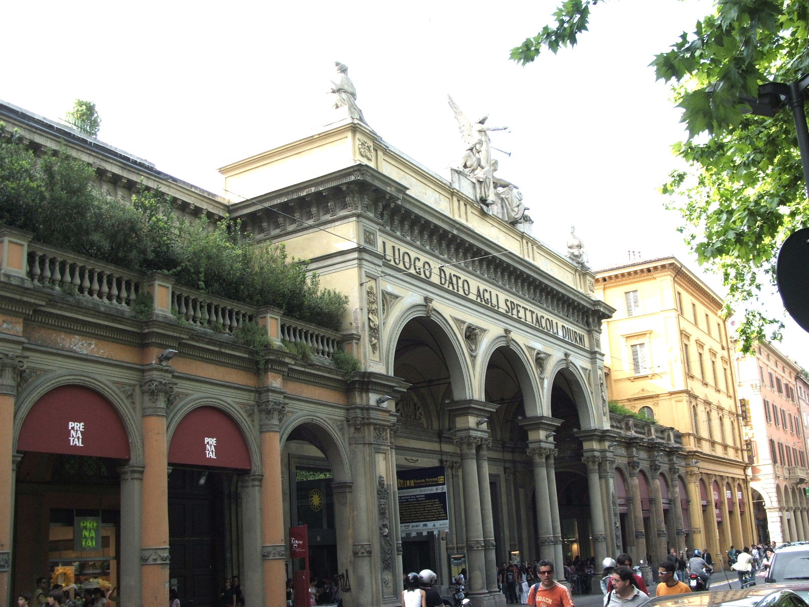 Bologna, il teatro Arena del Sole di via dell'Indipendenza